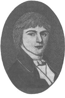 Portrait de Franciszek Lessel (1780-1838), compositeur polonais.